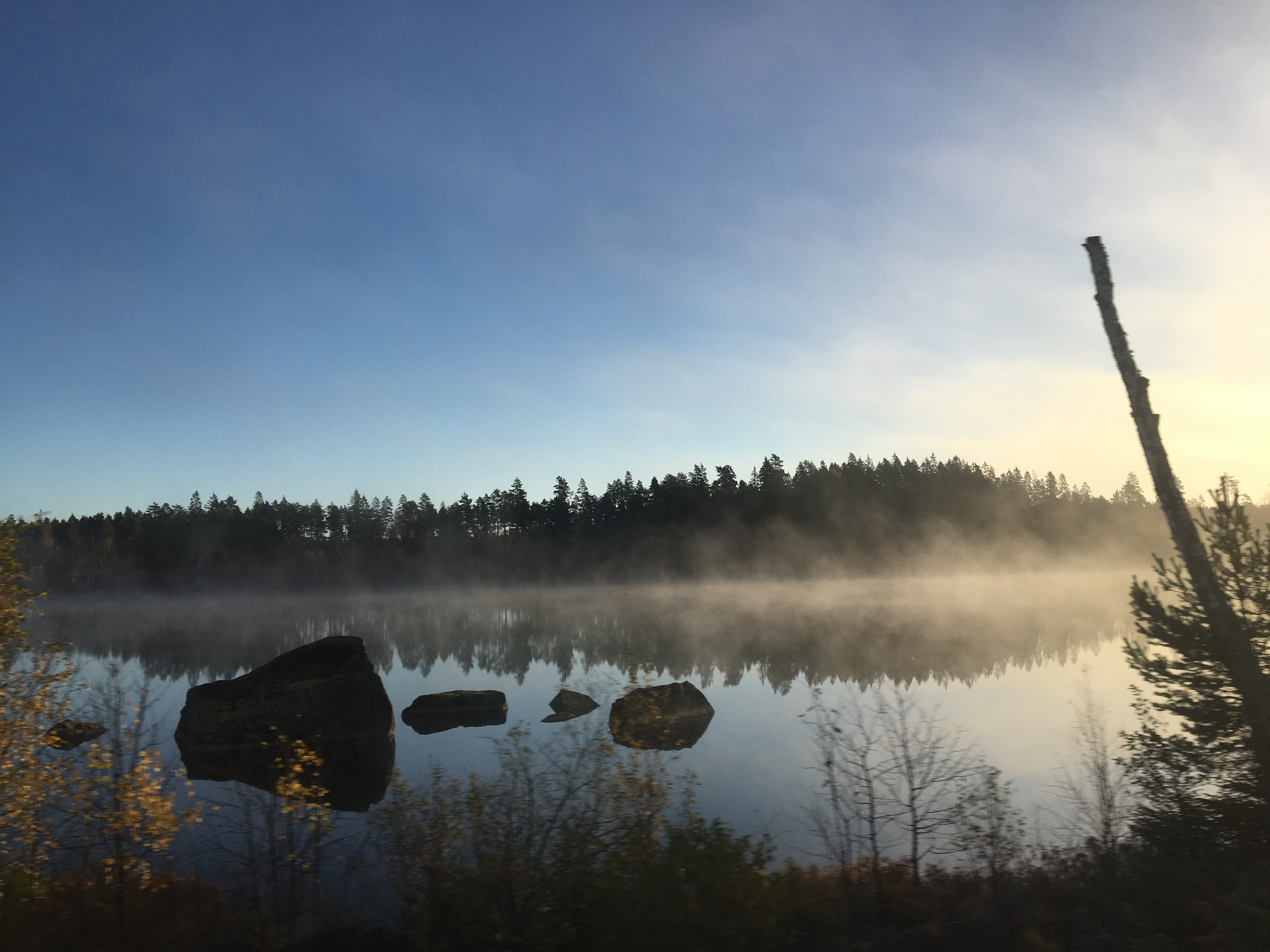 Foto taget från tåget.